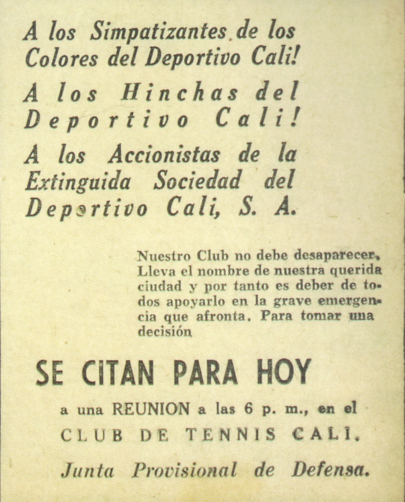 Invitación para salvar al club Deportivo Cali de la crisis del 51